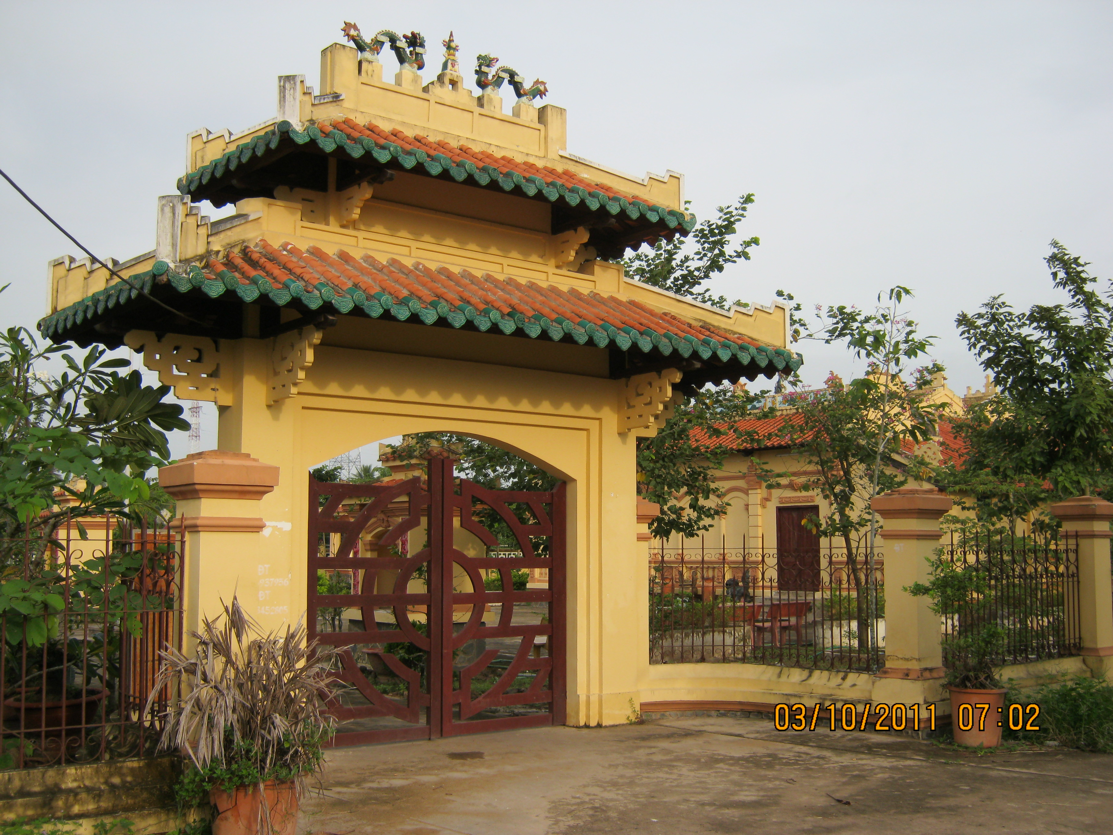 Đình Tân Hoa ở ấp Tân Hưng, xã Tân Hòa, thành phố Vĩnh Long, tỉnh Vĩnh long. Đây là di tích "lịch sử-văn hóa" cấp quốc gia Việt Nam.